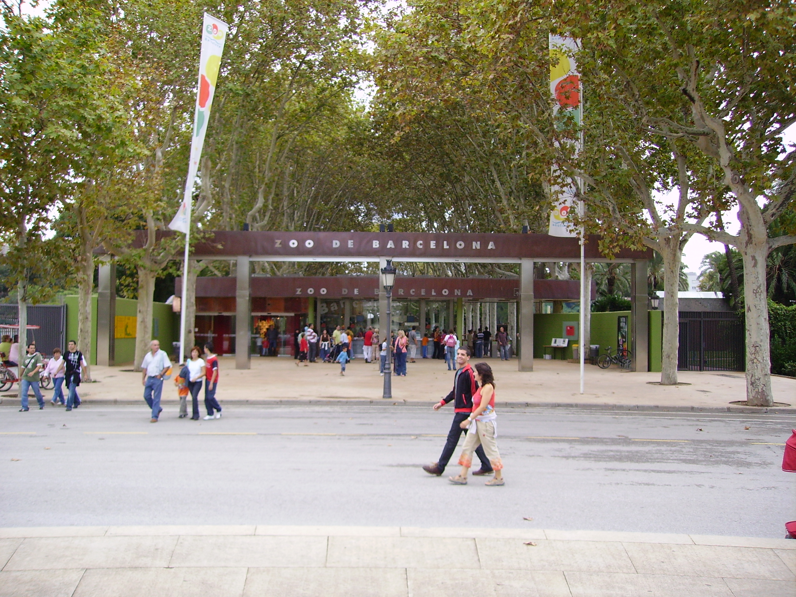 Zoo de Barcelona